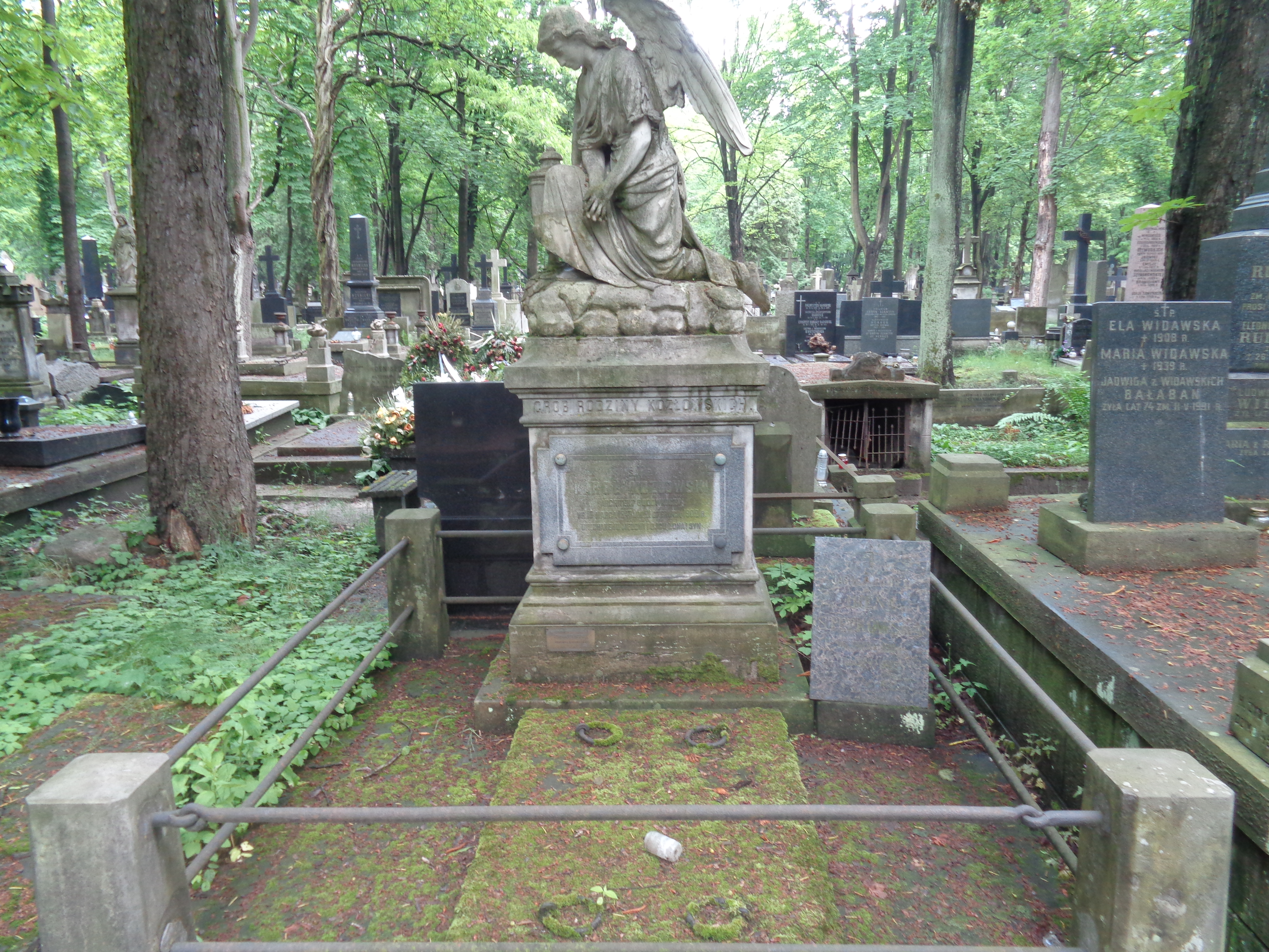 Grób architekta Karola Kozłowskiego na Cmentarzu Powązkowskim